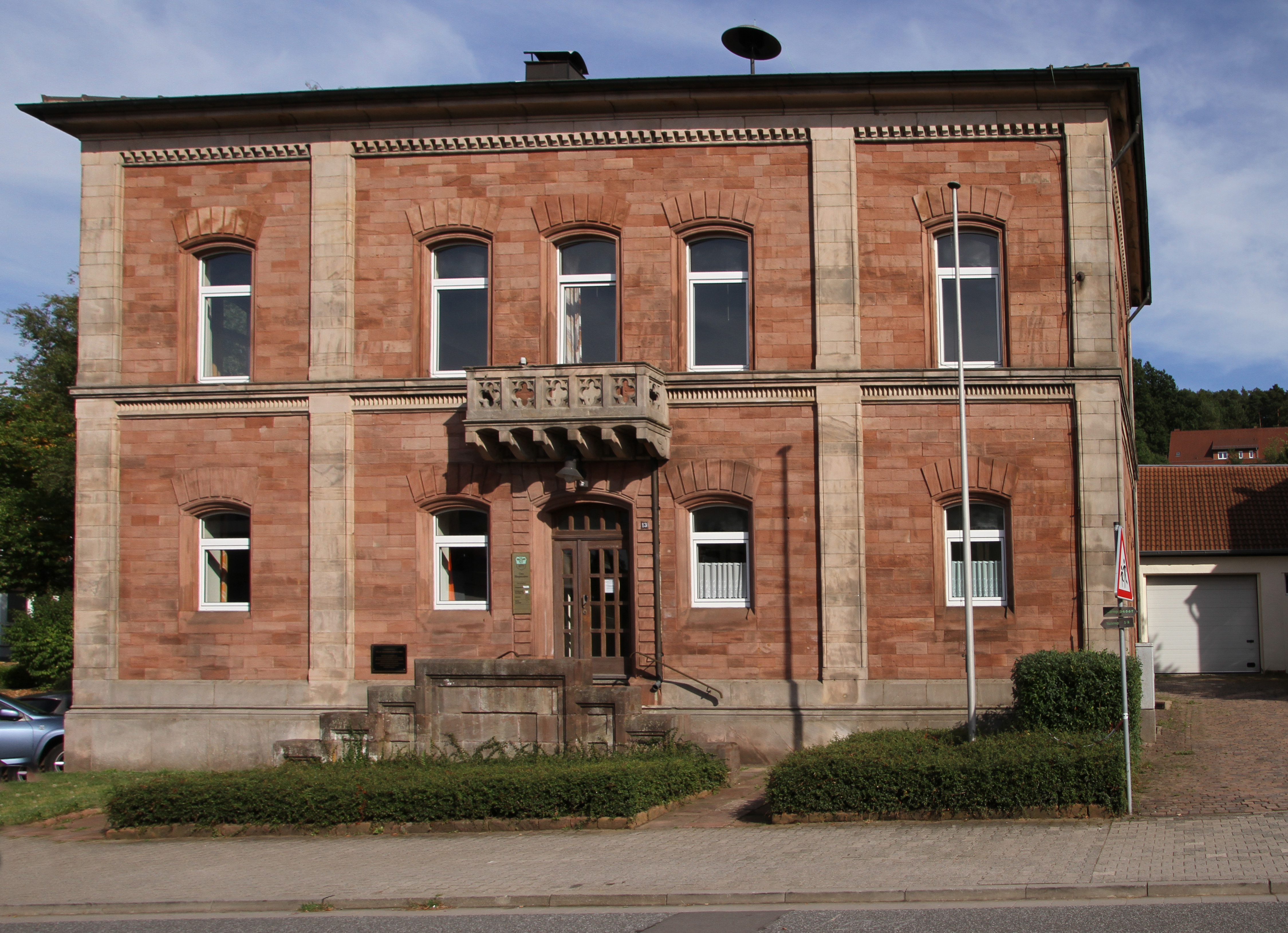 Schopp, Hauptstraße 13; ehemaliges Rat- und Schulhaus; spätklassizistischer Walmdachbau, Mitte des 19. Jahrhunderts.